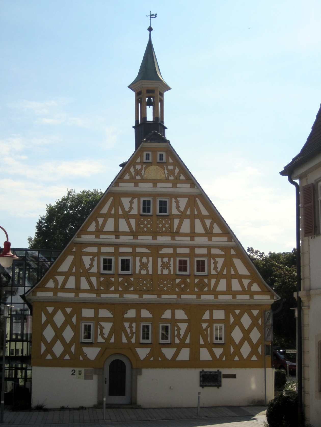 Das ehemalige Rathaus in Neckartailfingen, Nürtinger Straße 2. Heute wird es als Notariat genutzt. Es ist ein eingeschossiger , unverputzter Fachwerkbau über gemauertem Sockelstock aus der Zeit zwischen 1660 und 1680 (Heimatbuch des Kreises Nürtingen, Band II, Seite 622), ein winziges Krüppelwalmdach schließt den mit Fachwerkschnitzereien verzierten Giebel ab, darüber ein achtseitiges Türmchen mit Glockenstuhl. Noch in den 1940er Jahren (nach einer Aufnahme der Württembergischen Landesbildstelle) führte eine Treppe zum Eingang auf der rechten Seite der Vorderfront, der Sockel bot Zugang zu den Kellerräumen.